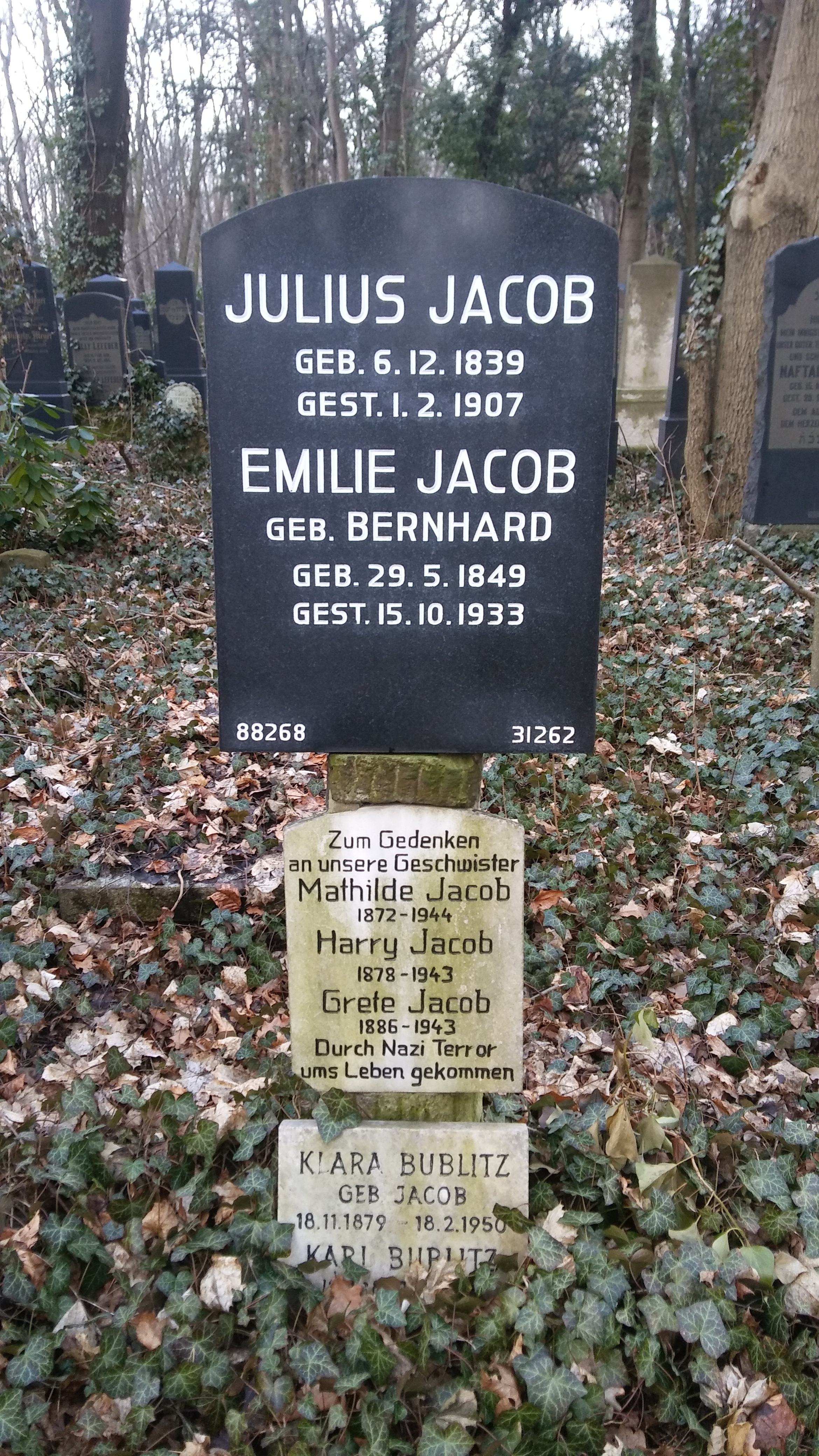 Gedenktafel für Mathilde Jacob auf dem Grab ihrer Eltern auf dem Jüdischen Friedhof Berlin-Weißensee. Geburts- und Sterbejahr sind nicht korrekt.